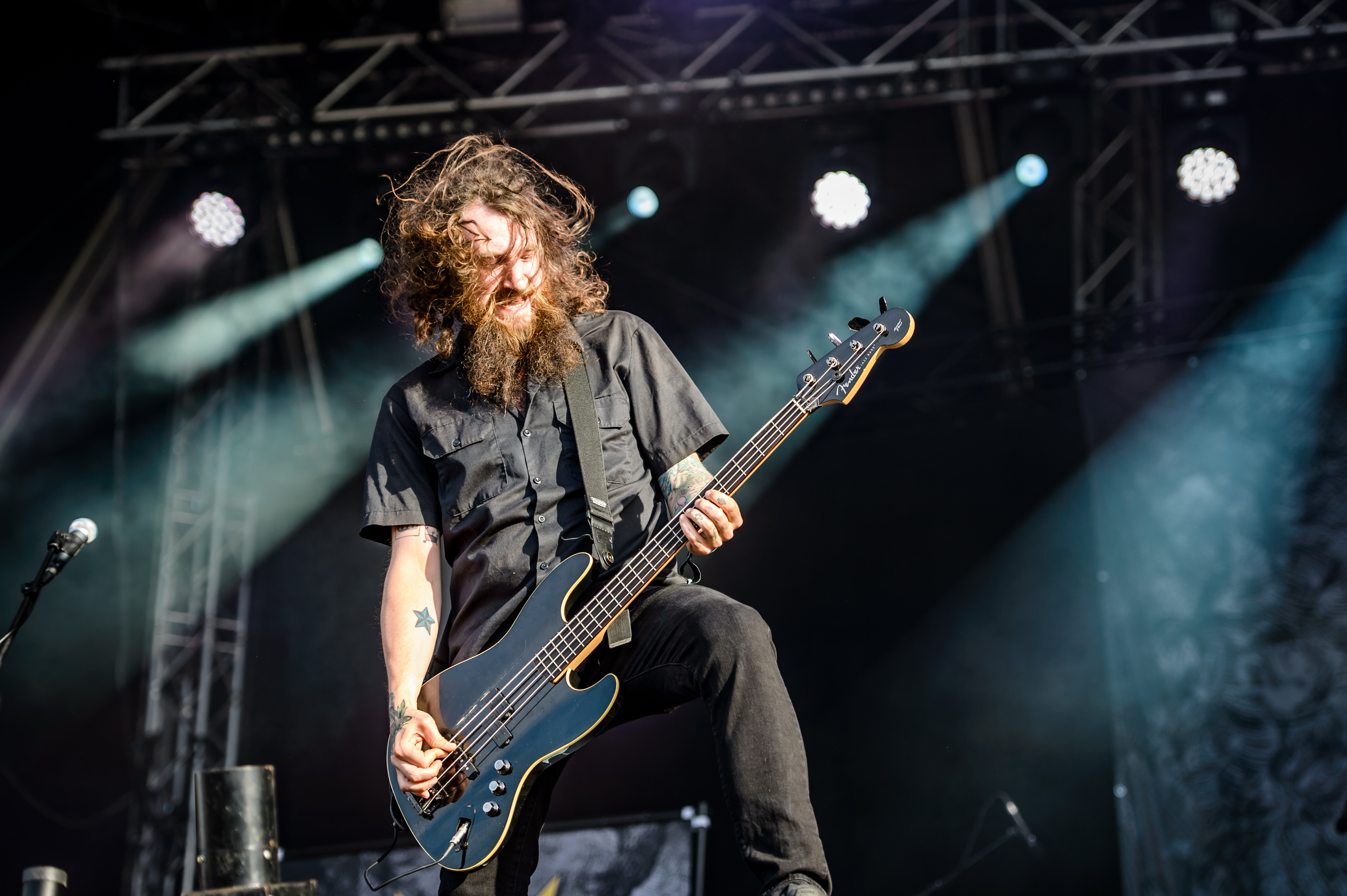 'RockHarz Open Air 2016; Ballenstedt': 'Soilwork'